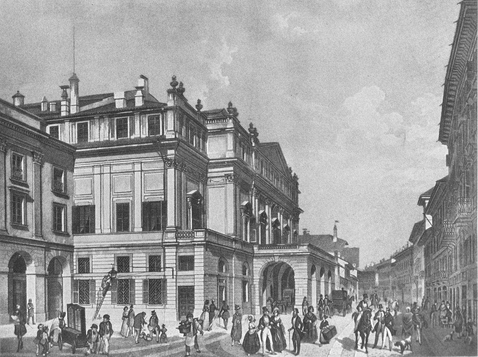 Facciata del teatro alla Scala, J. J. Falkeinsen e L. Cherbuin, 1850 circa